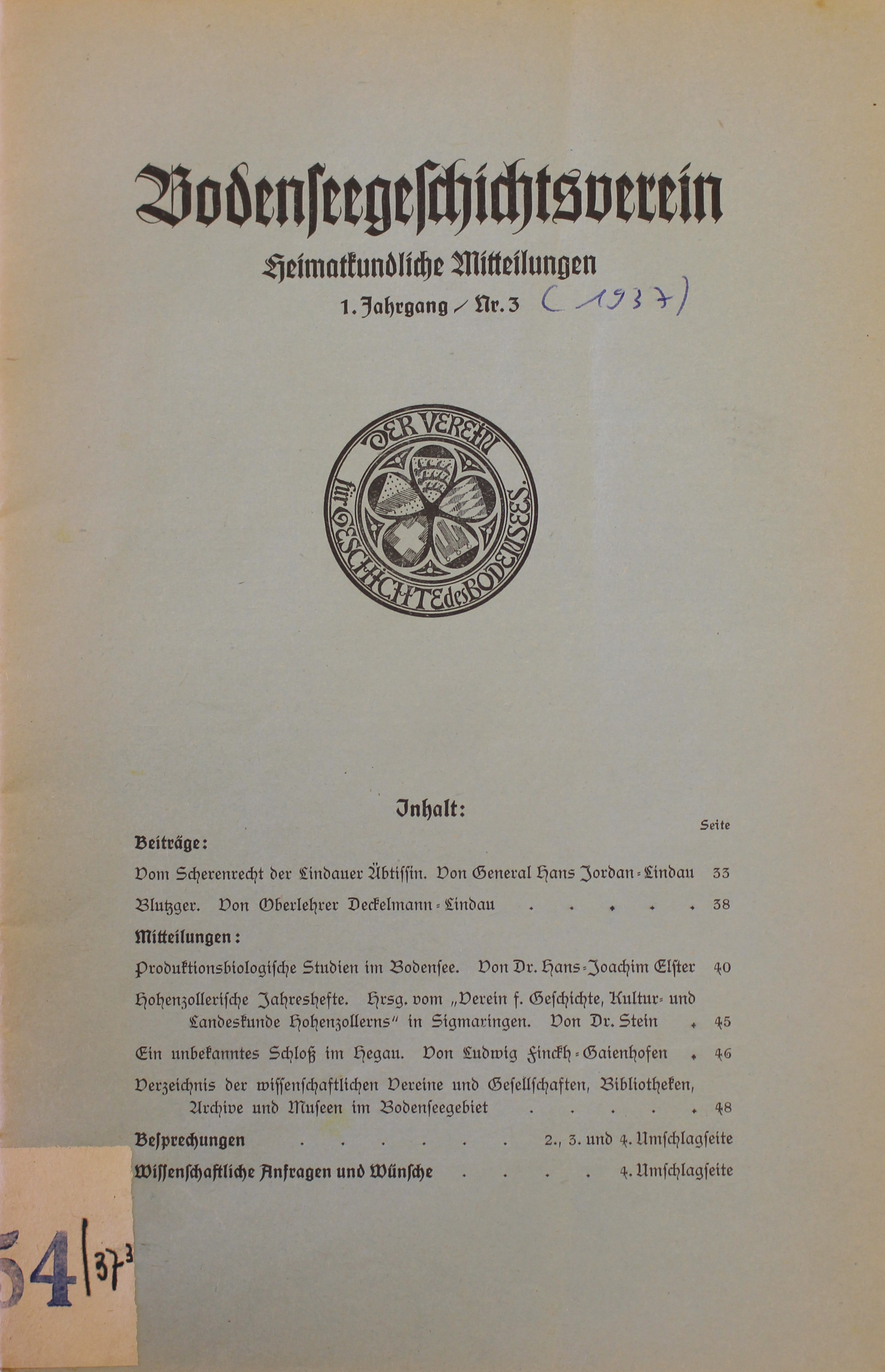 Heimatkundliche Mitteilungen des Vereins für Geschichte des Bodensees und seiner Umgebung, 1. Jahrgang (1937), Heft 3